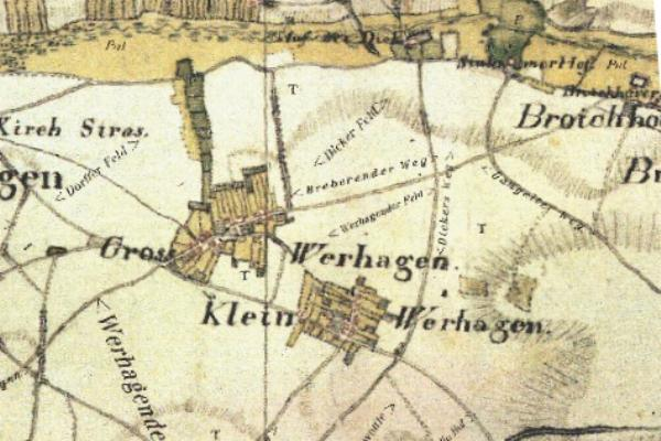 Kartenaufnahme der Rheinlande 1804/05